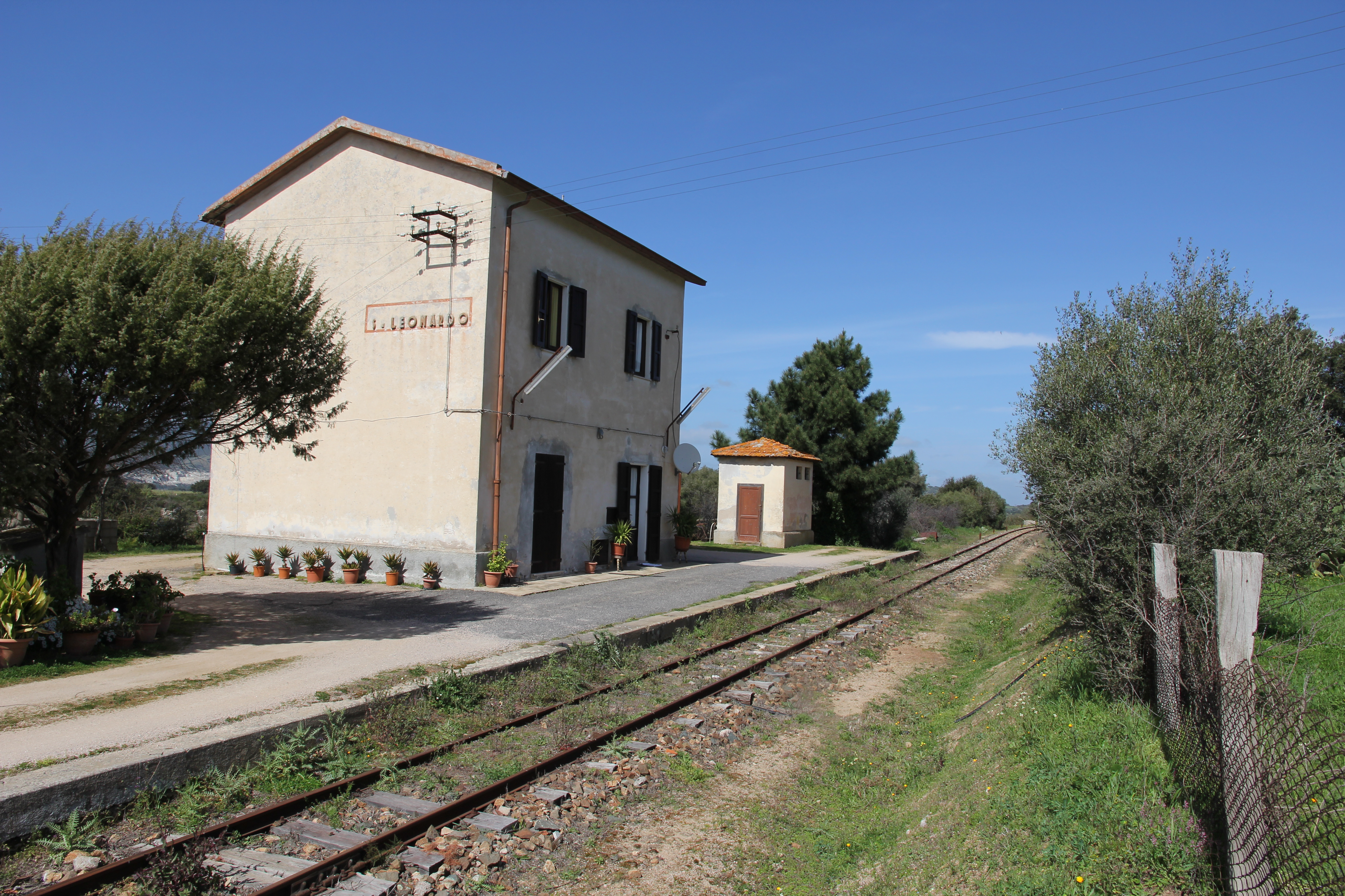 Calangianus - Stazione ferroviaria di San Leonardo